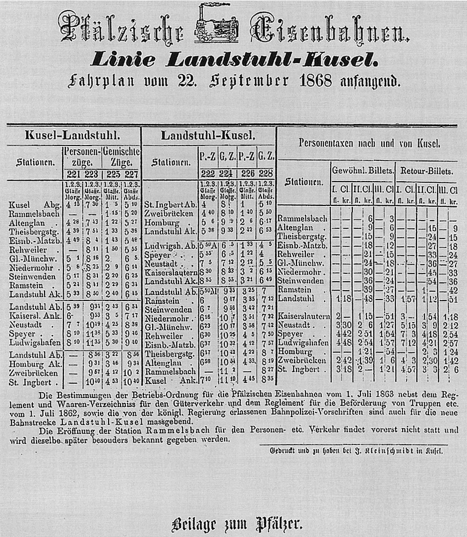 Erster Fahrplan der Bahnstrecke Landstuhl-Kusel